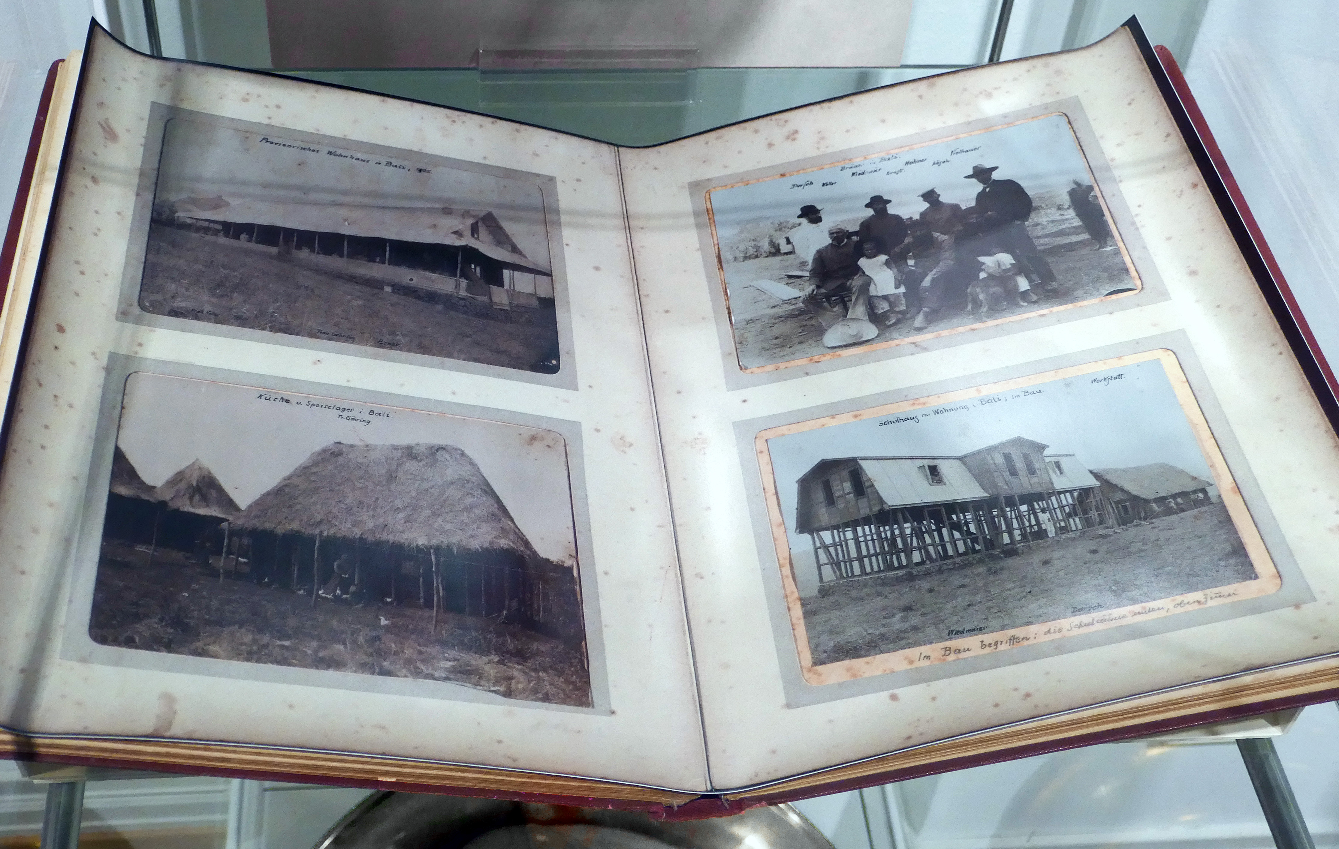 Fotoalbum Heinrich Dorsch, Kamerun (Bali), 1904-1910. Heinrich Dorsch war als Missionar der Basler Mission in Kamerun tätig, er hinterliess fünf Fotoalben. Museum im Ritterhaus (Offenburg). Ein Fenster zur Welt. Die kolonialzeitliche Sammlung. Leihgabe : Silvia Hess.